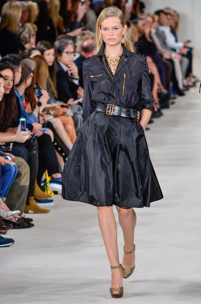 Anna Ewers walking the Ralph Lauren Spring/Summer fashion show.